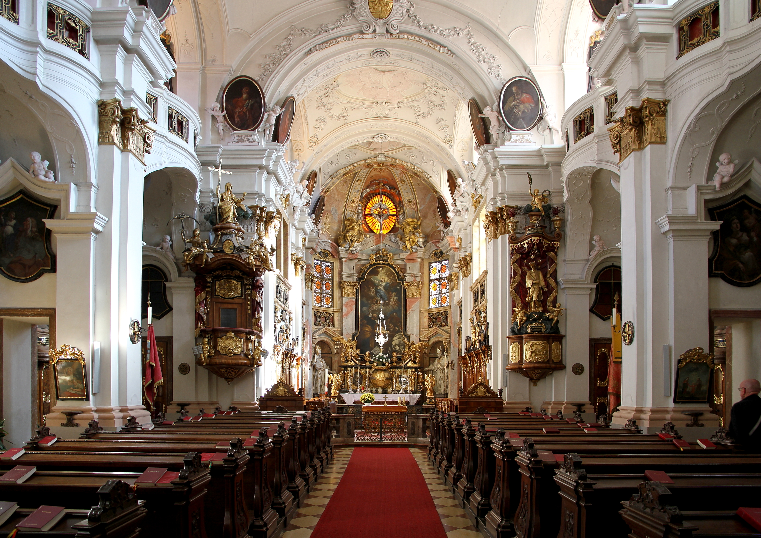 Innenansicht der Kirche des ehemaligen Augustinerchorherrenstiftes in Dürnstein.